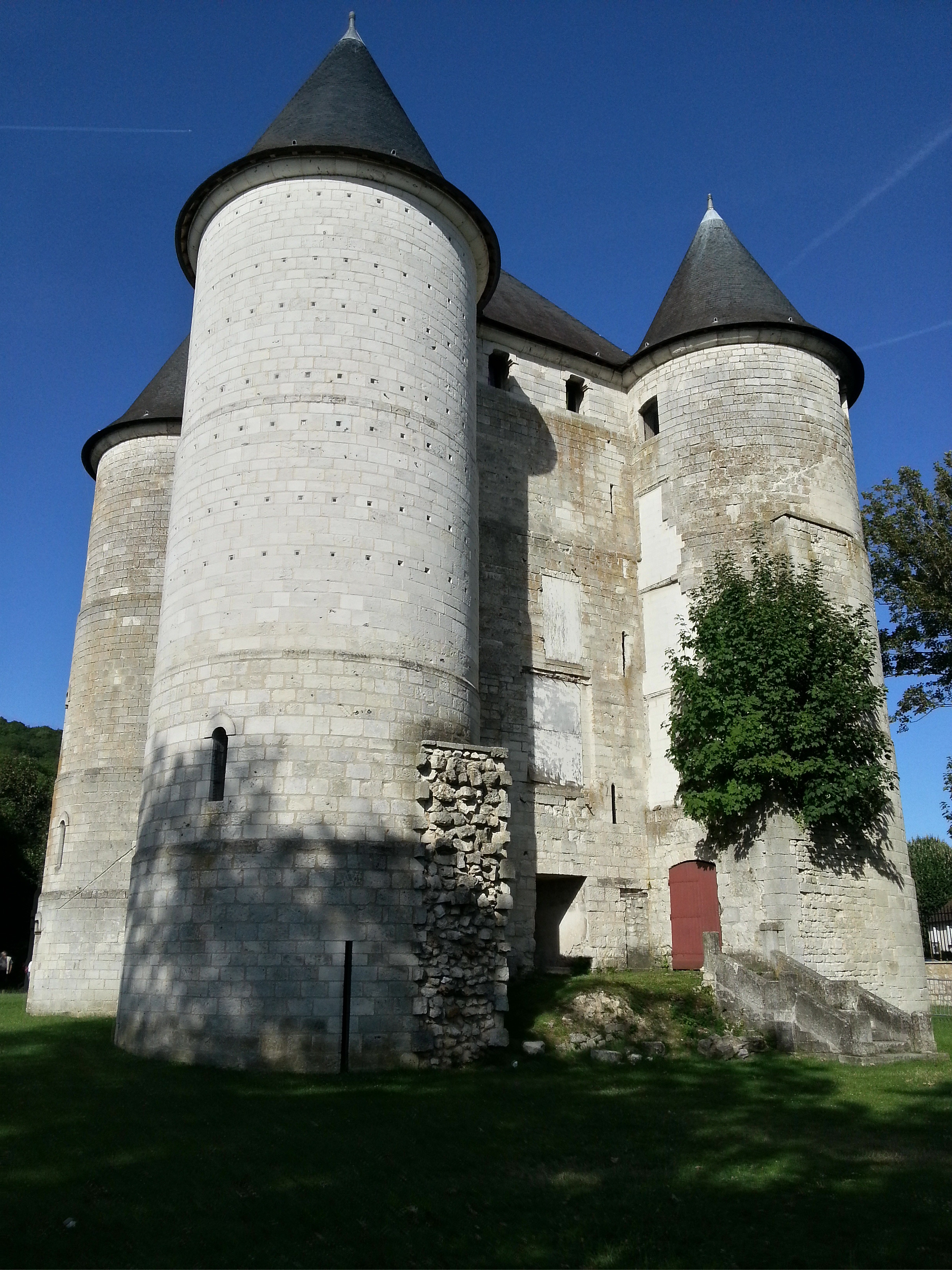 Le château des Tourelles, de Vernon (Eure), France, vu du Sud-Ouest.